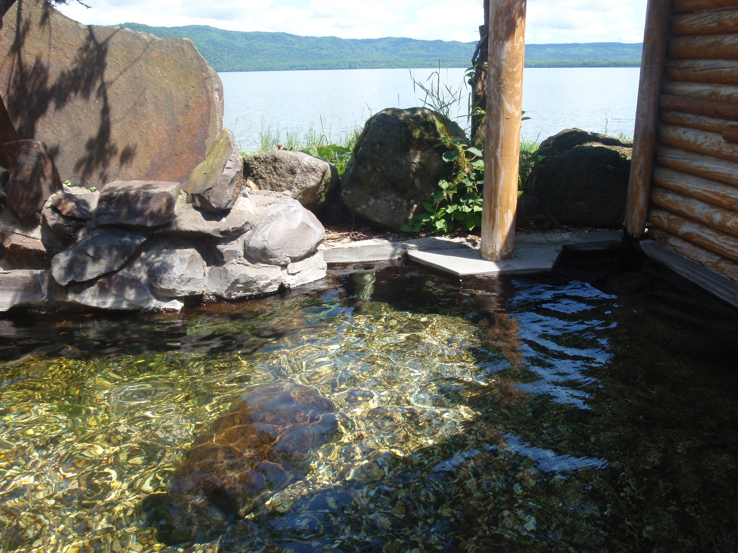 仁伏温泉、屈斜路湖ホテル、露天風呂